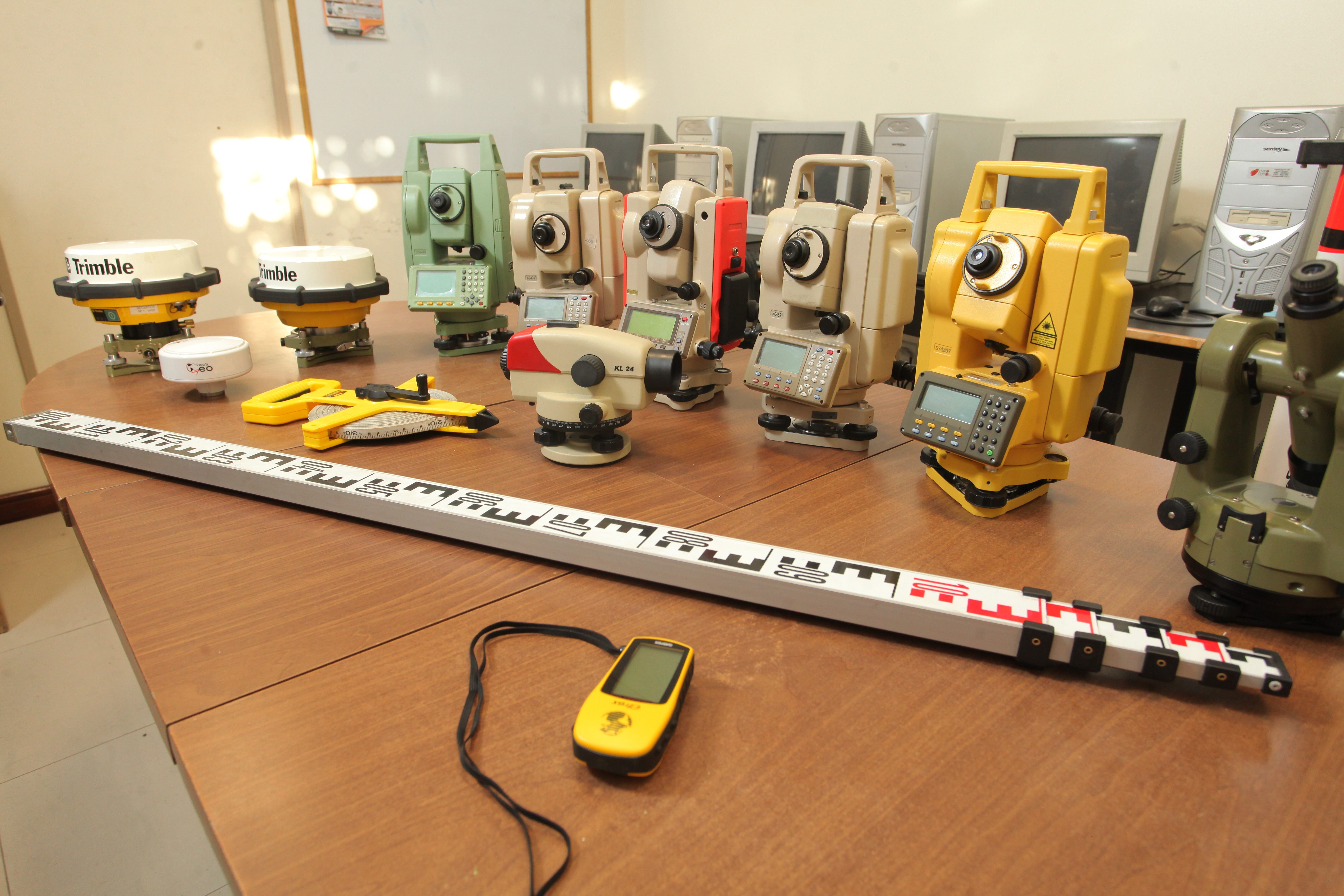 lab agrimensura